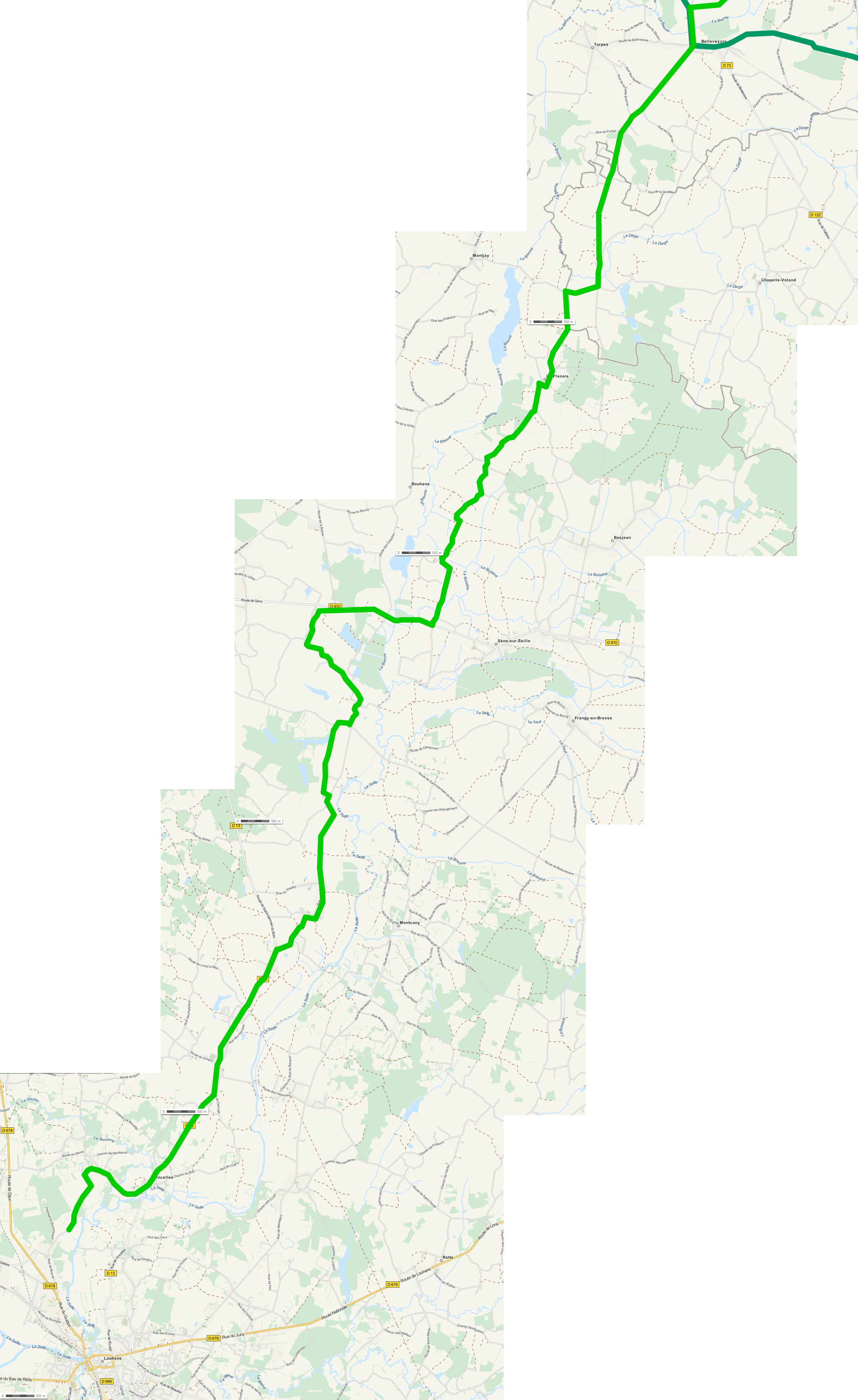 Karte der Römerstrasse von Louhans nach Tavaux - Teilstück (Louhans) Les Brenets bis Bellevesvre Carte de la voie romaine de Louhans à Tavaux - Partie de (Louhans) Les Brenets à Bellevesvre This map may be incomplete, and may contain errors. Don't rely solely on it for navigation.